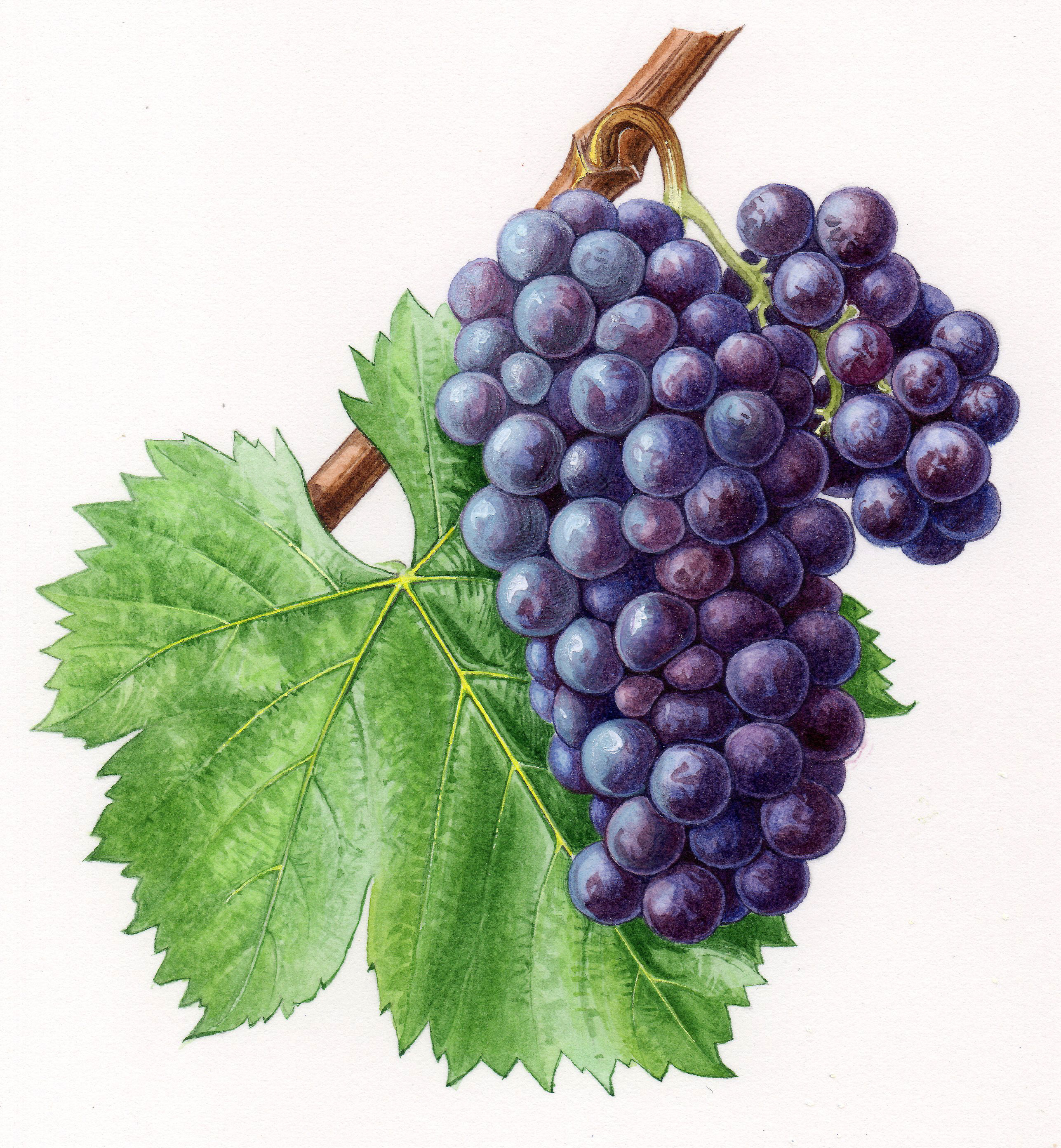 Aquarelle originale pour les Cépages de France (2001)